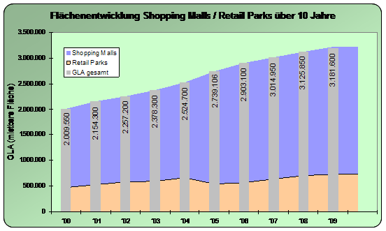 Flächenentwicklung Shopping Malls und Retail Parks der letzten 10 Jahre